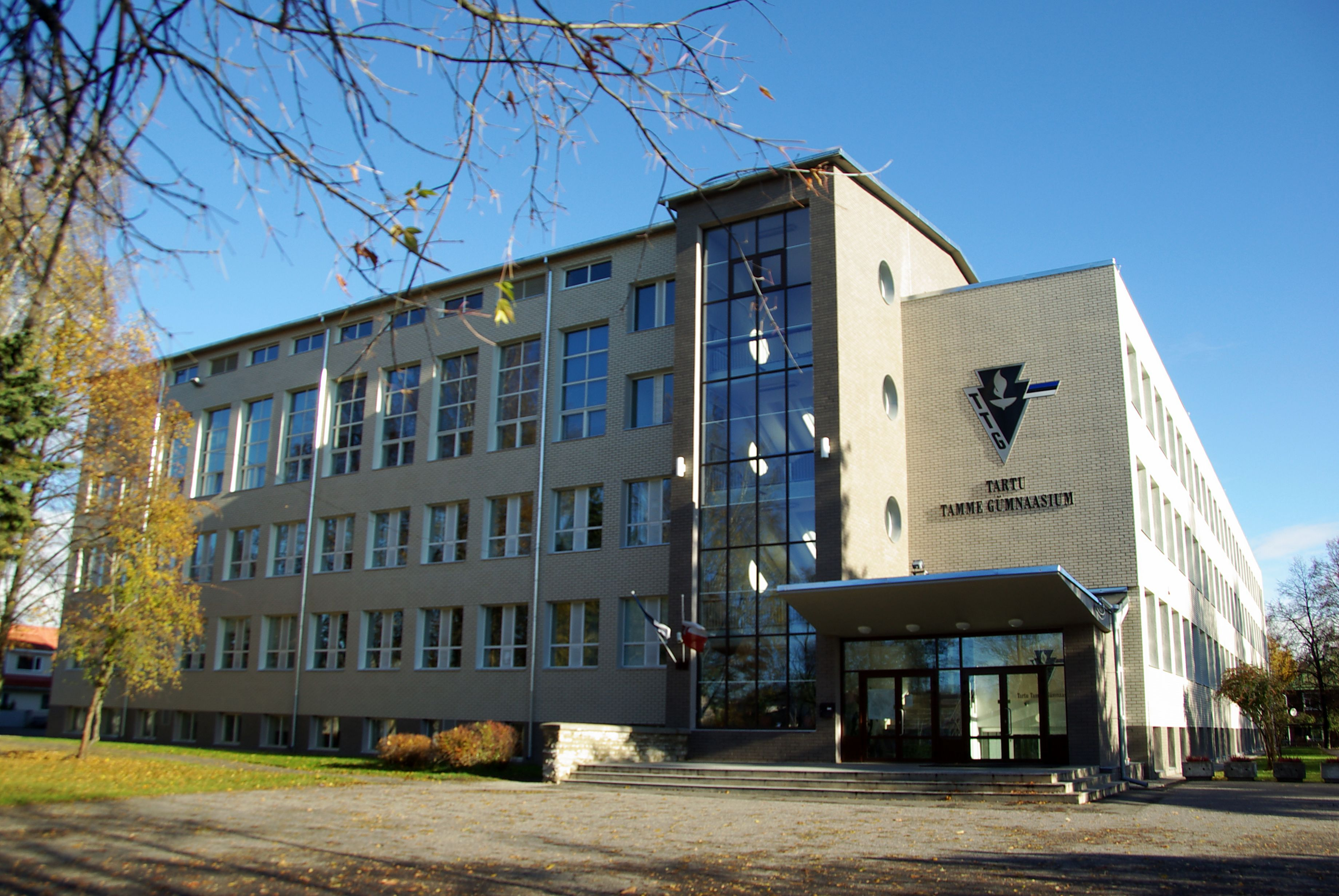 Gümnaasium Tartus Tammelinnas